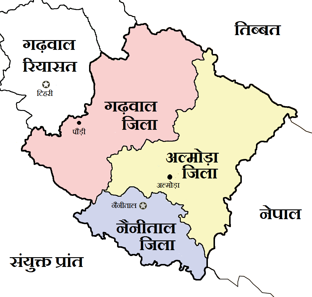 कुमाऊँ मण्डल के जिले, 1909